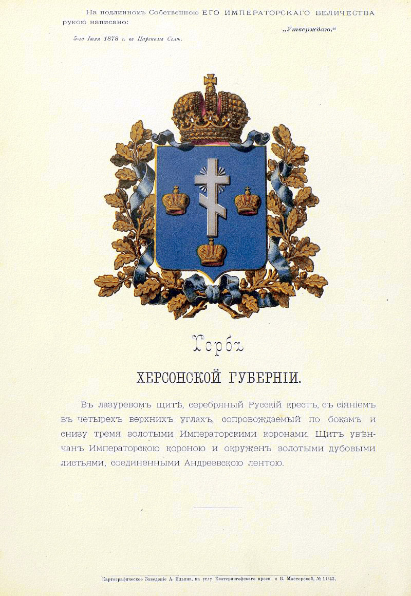 Official Russian Empire coat of arms Kherson Governorate. Герб Российской Империи Херсонской губернии с официальным описанием в Гербовнике Бенке. Утверждён Императором Всероссийским Александром Вторым в 1878 году.